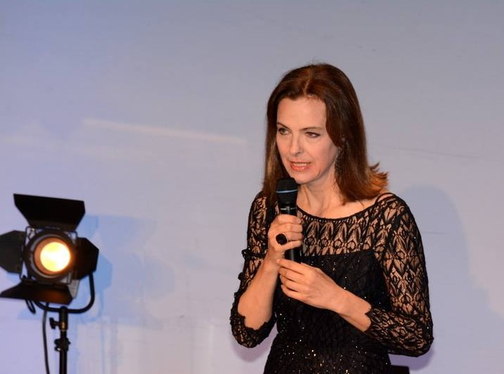 Carole Bouquet à la cérémonie des prix Lumières 2014